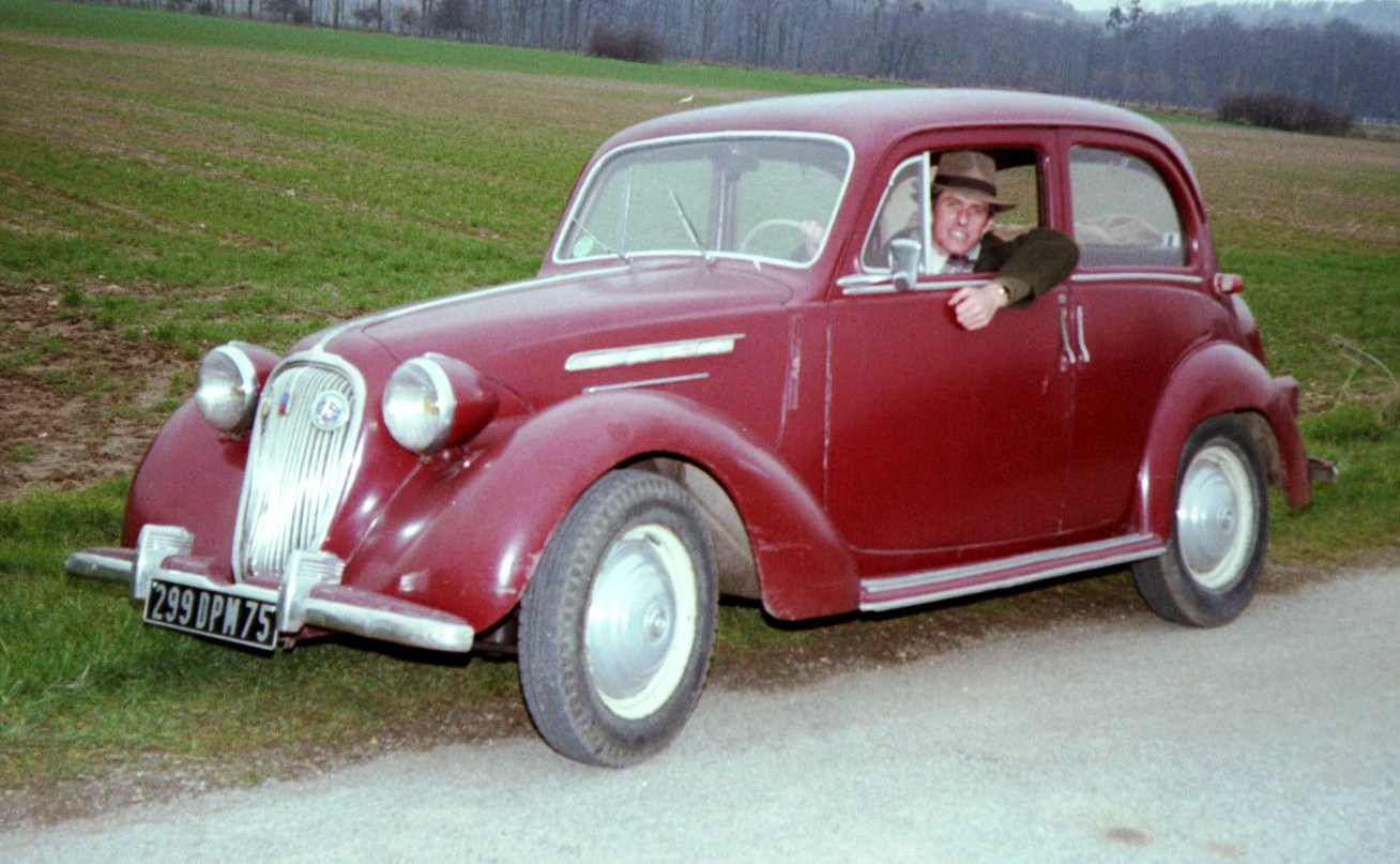 Simca 8 immat Paris